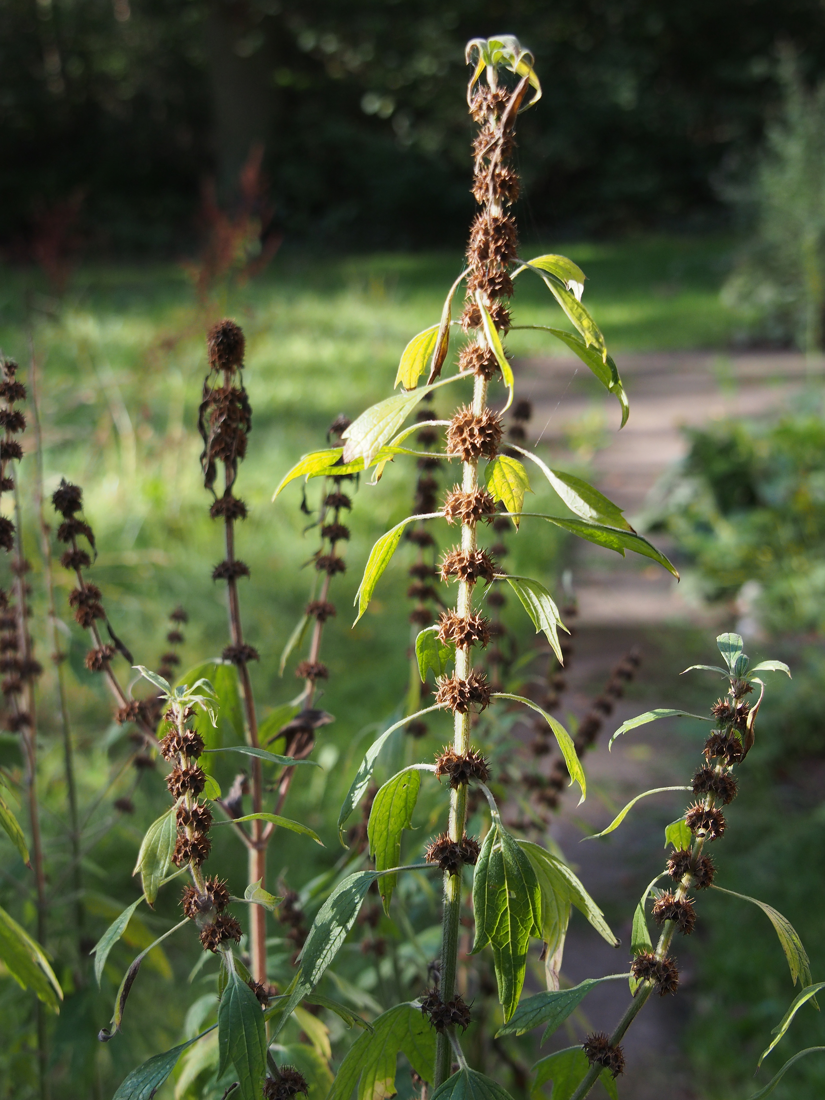 Echtes Herzgespann (Leonurus cardiaca) (verblüht) im Naturpark Südheide